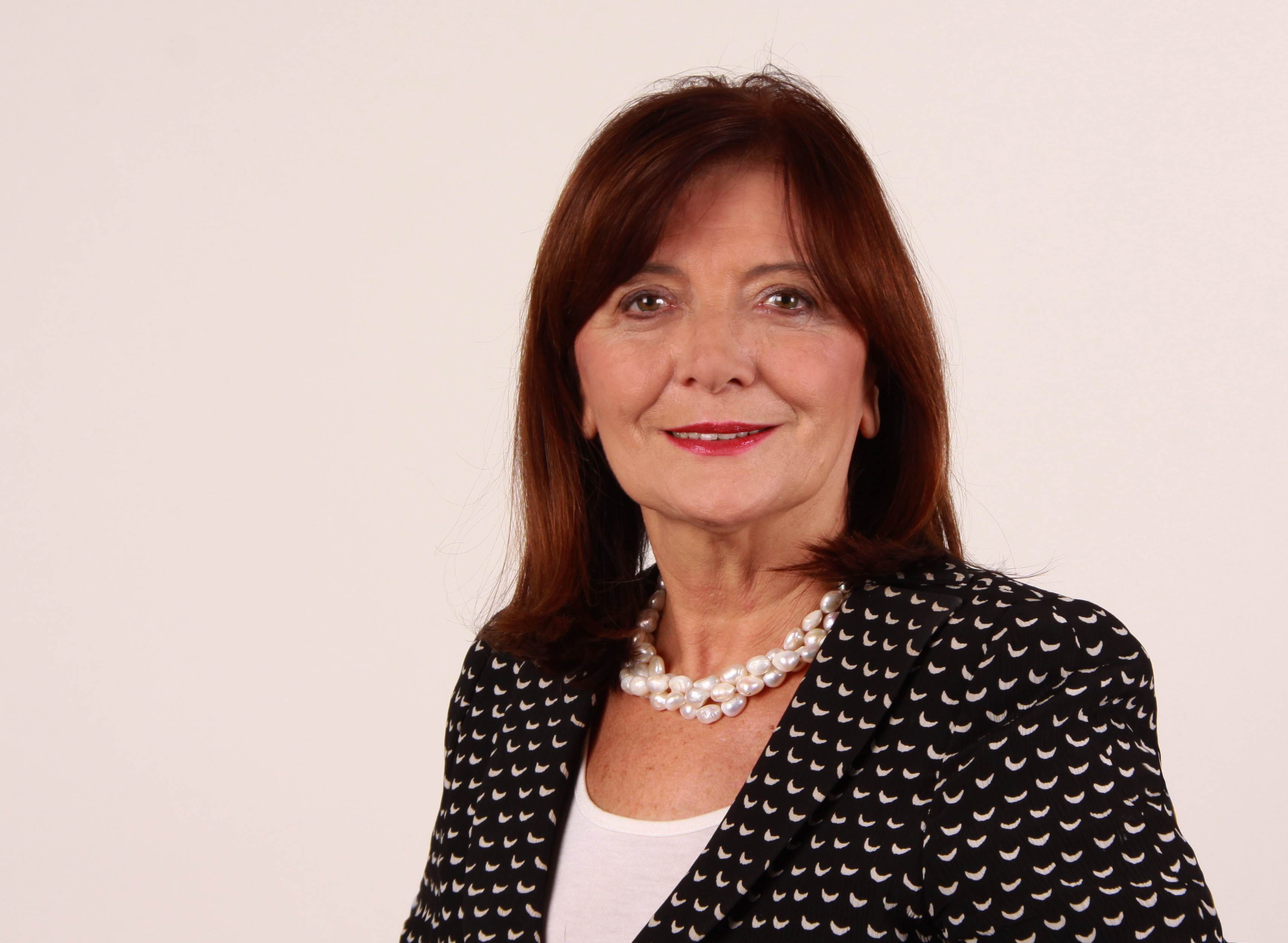 Abgeordnete/r Europaparlament